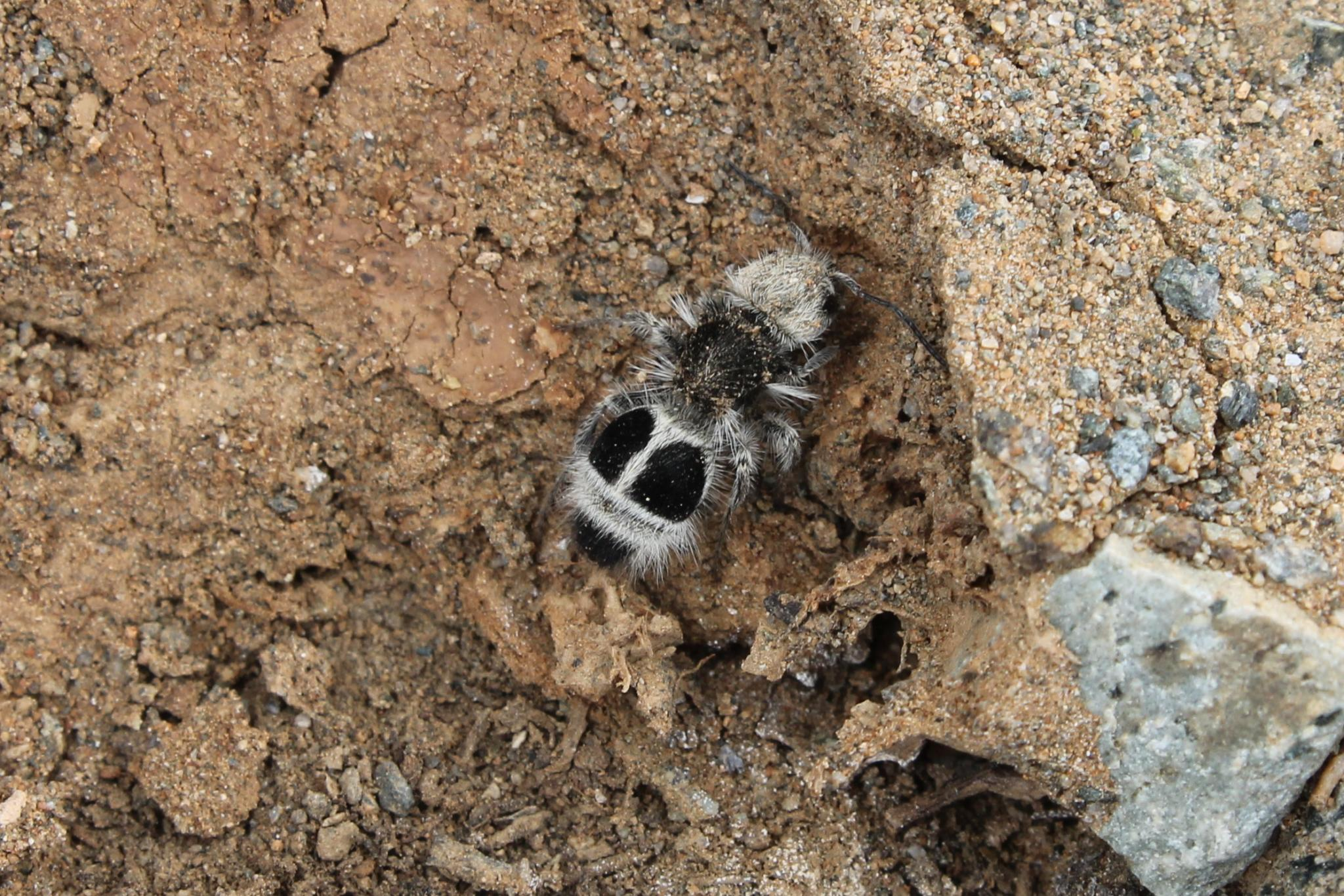 En propiedad es una avispa sin alas. Quebrada El Medano, Paposo